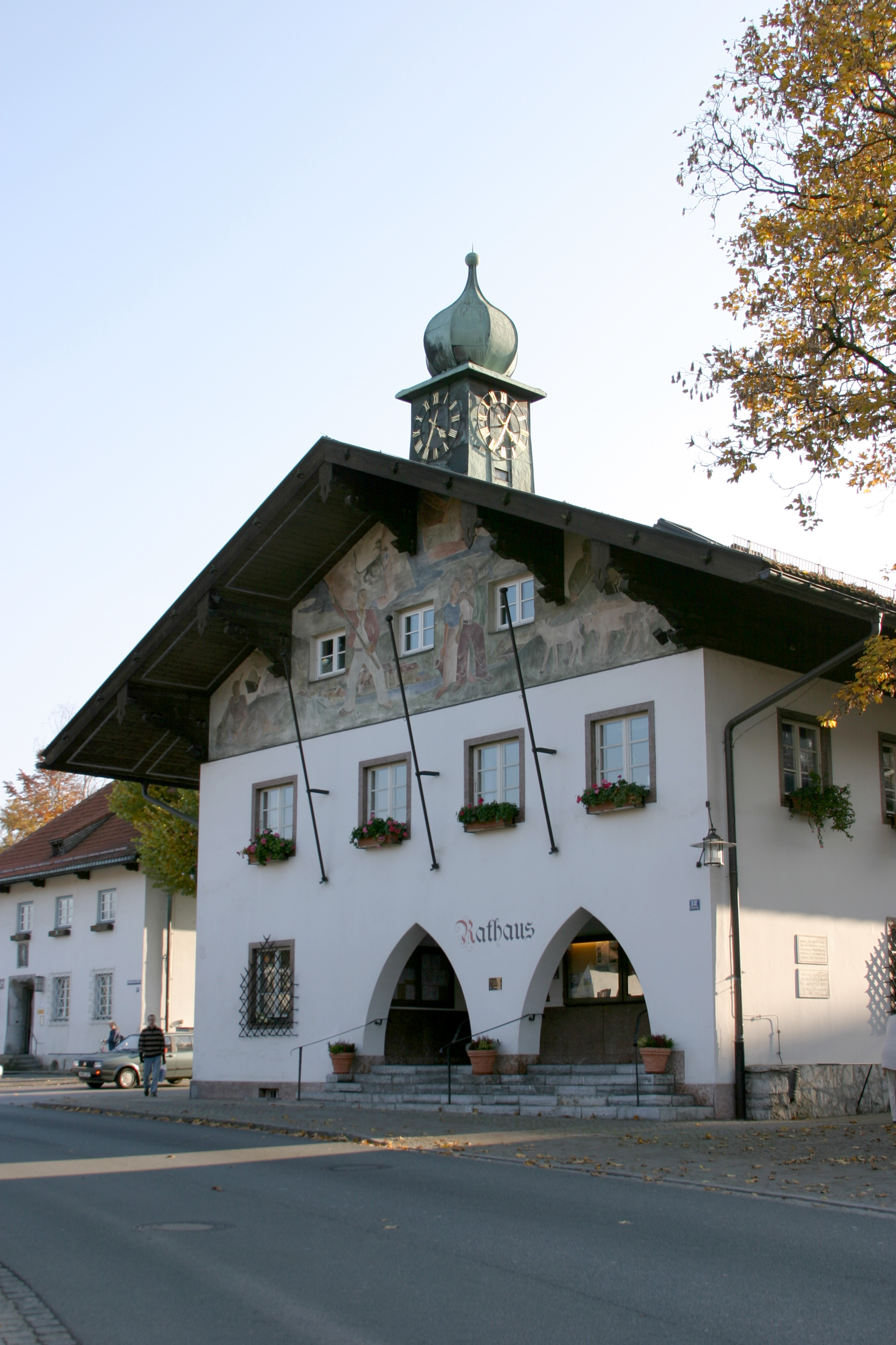 Rathaus in Bad Wiessee; zweigeschossiger Flachsatteldachbau mit Dachreiter, offenen Erdgeschossarkaden, südseitiger Altane und Fassadenmalereien, im reduzierten Heimatstil, 1930/31 von Hermann Lang, 1979/80 westliche Erweiterung This is a photograph of an architectural monument.